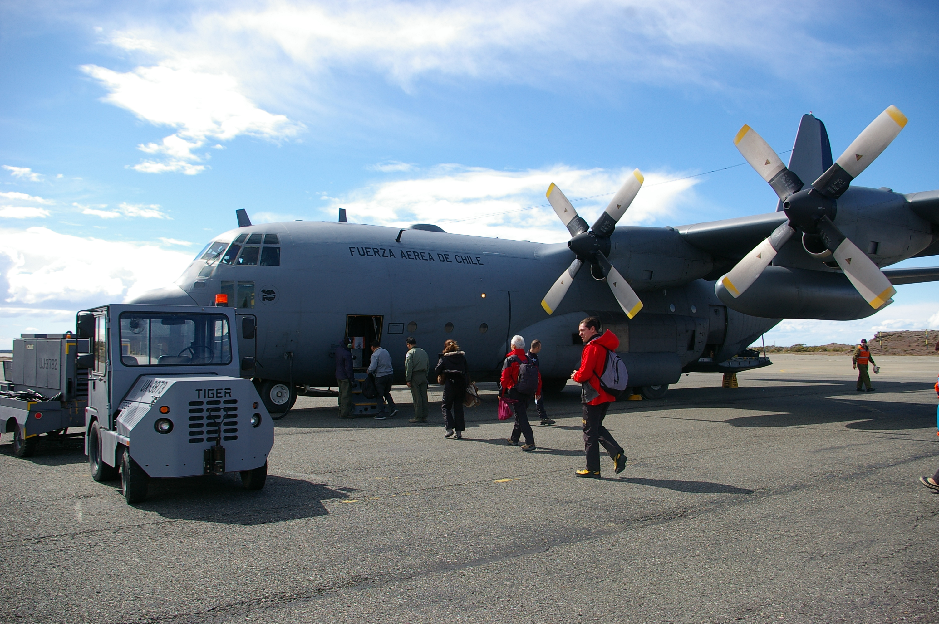 Este es el avión siniestrado mientras cubría la ruta Punta Arenas - Aeródromo Teniente Marsh en Isla Rey Jorge (Antártica Chilena)